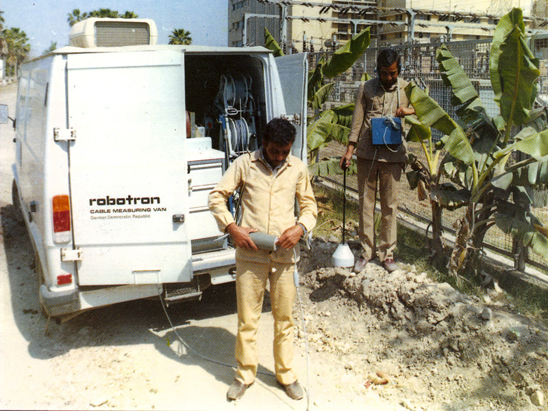 Ein Robotron-Kabelmesswagen im Einsatz